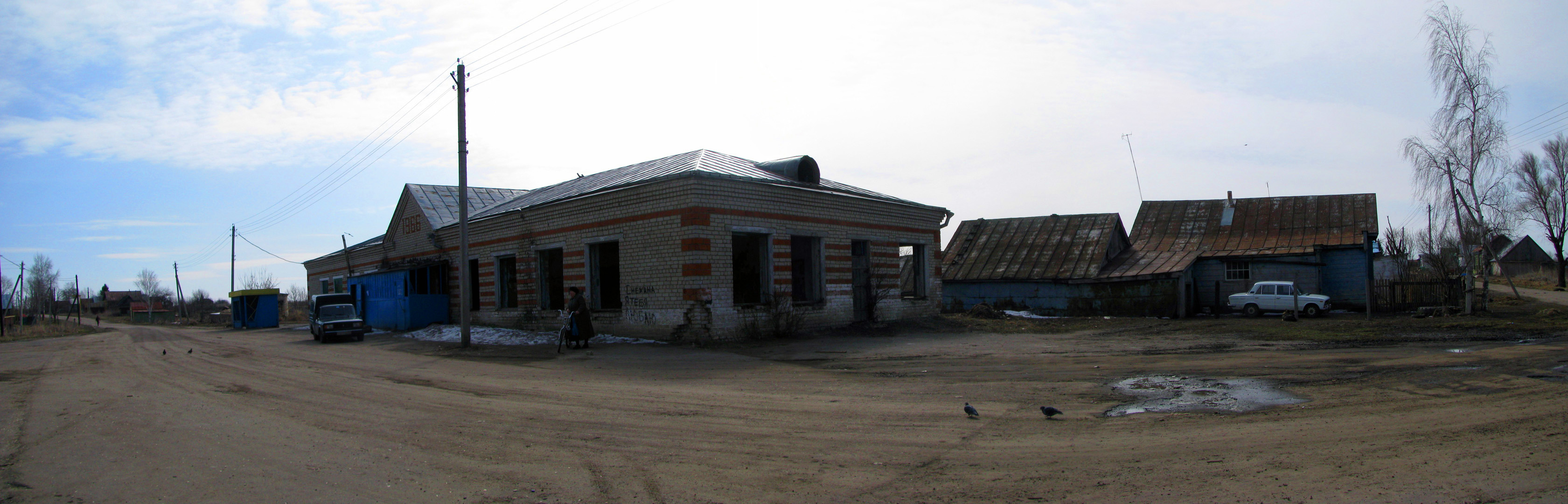 Панорама села Васильев Враг